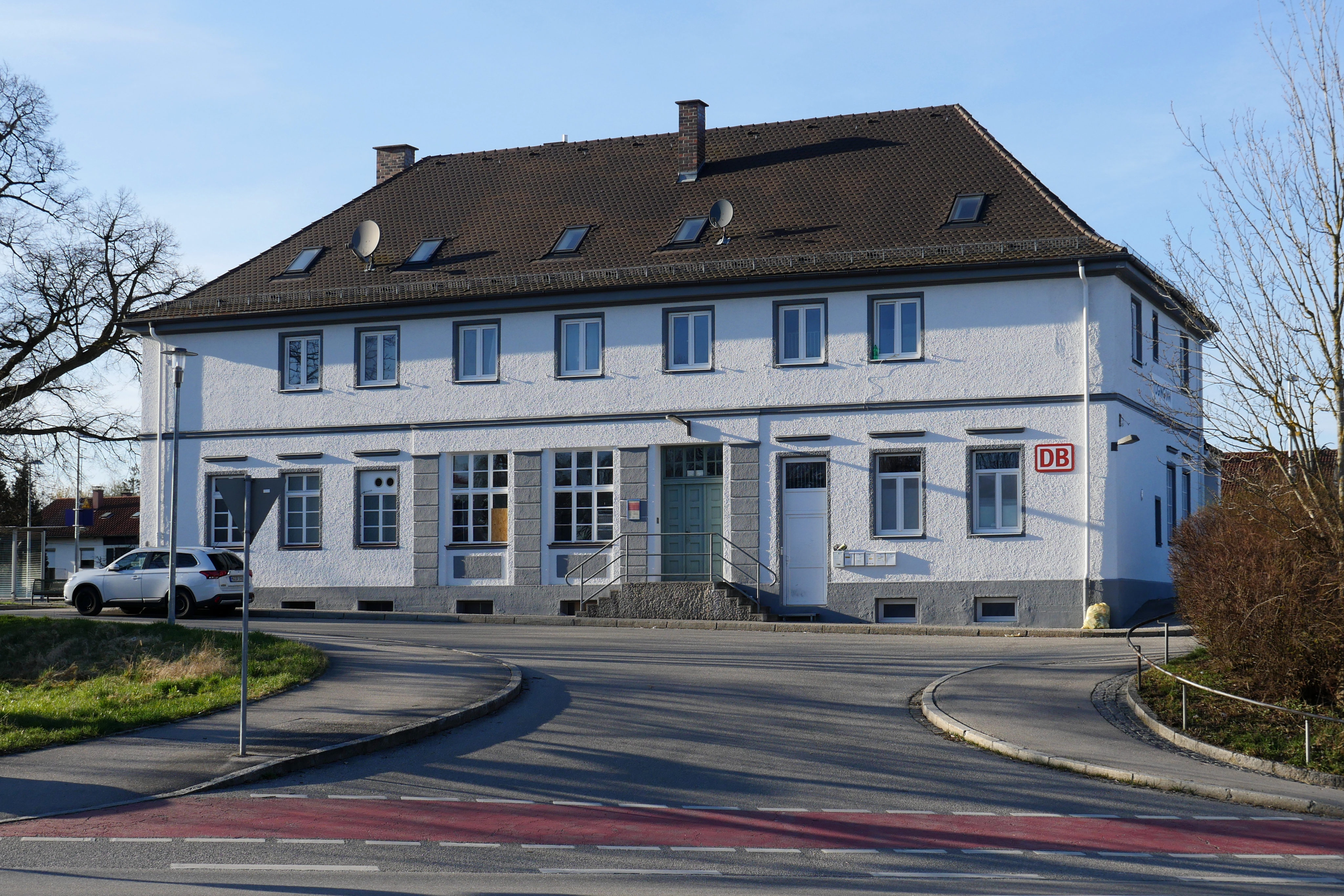 Empfangsgebäude des Bahnhofs Töging (Inn) von der Straßenseite.